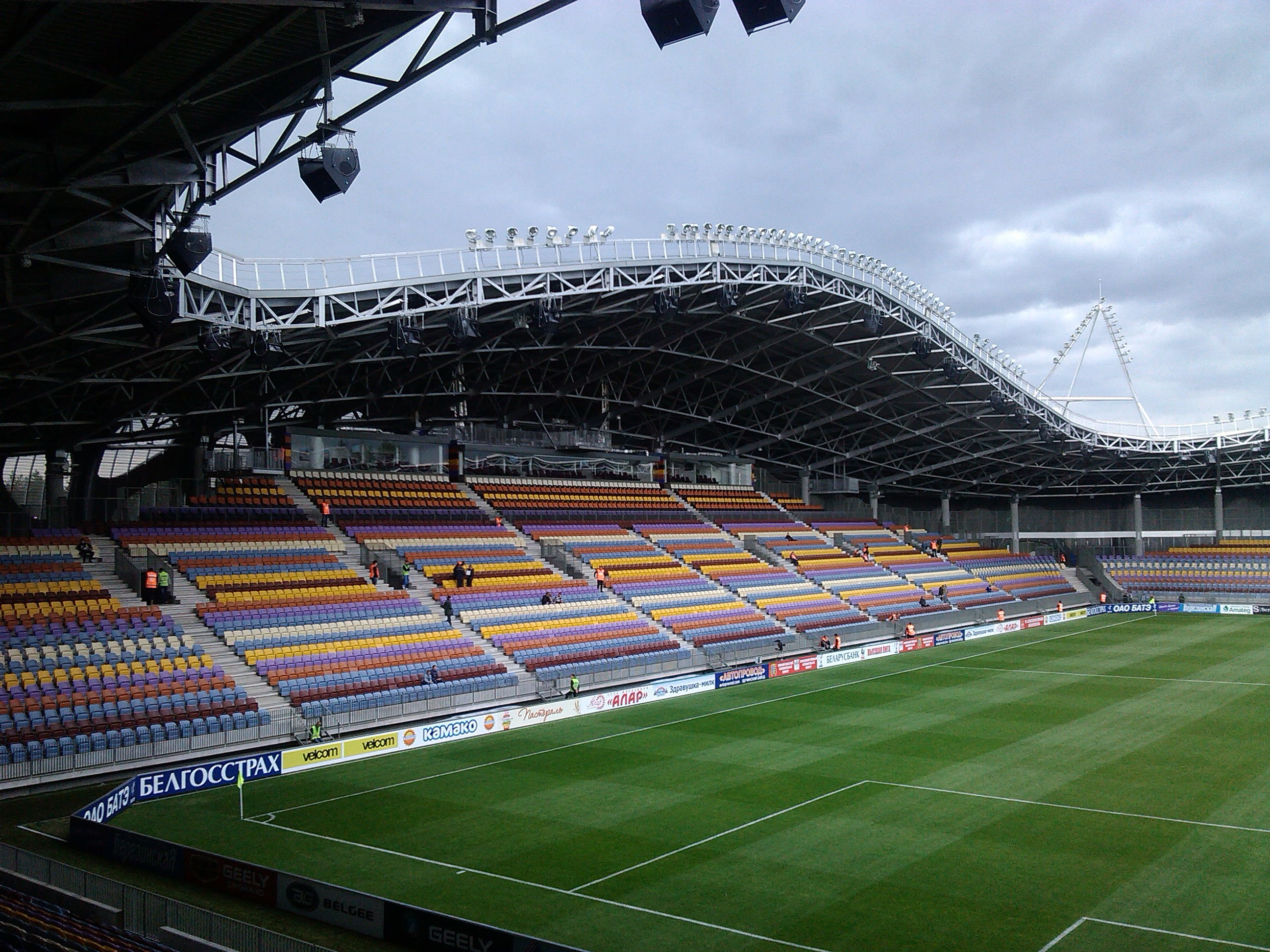 Трибуны Борисов-Арены